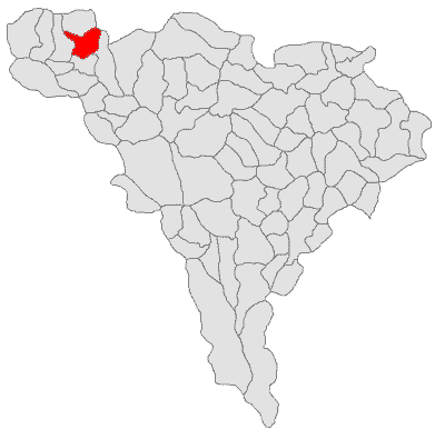 Categorie:Hărţi ale judeţului Alba